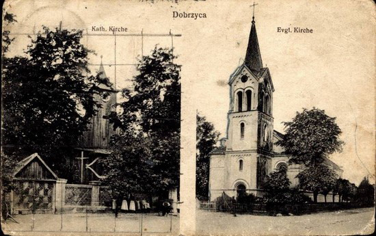 Widokówka z ok. 1920 Przedstawia dwa kościoły w Dobrzycy: katolicki przy ul. Rynek i ewangelicki przy ulicy Koźmińskiej